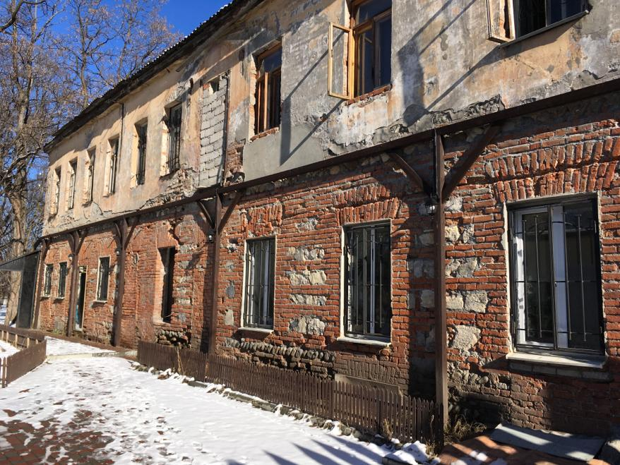 Сохранившаяся стена здания Управления почтово-телеграфного округа, площадь Свободы, Владикавказ